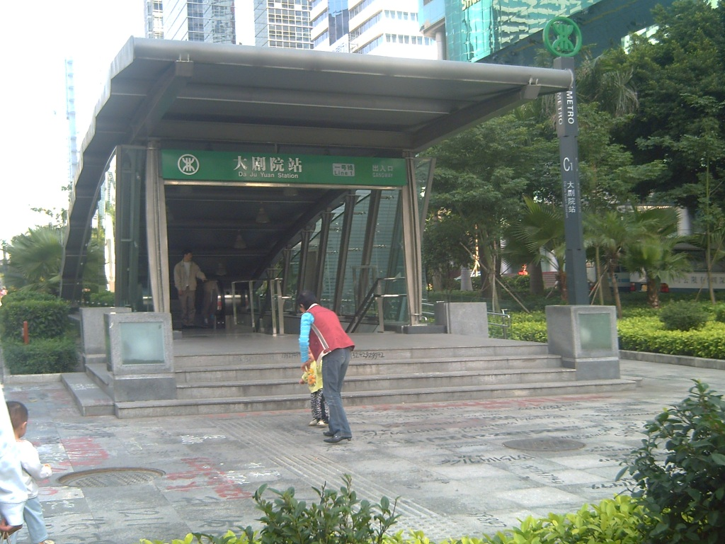 深圳地鐵的出入口 --Jack Chui 05:43:57 2005年11月20日 (UTC)